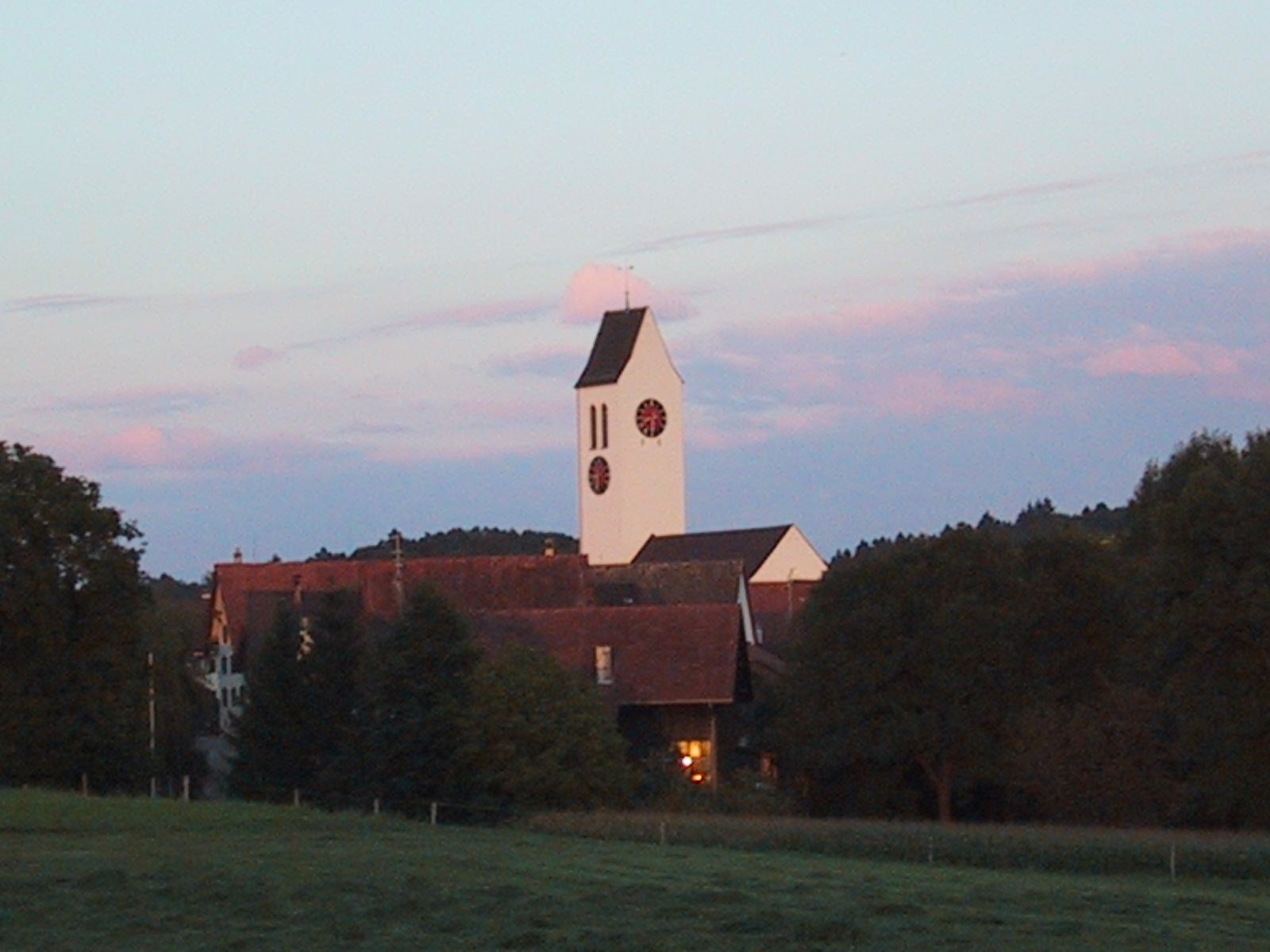 Kirche in Ossingen, Kanton Zürich